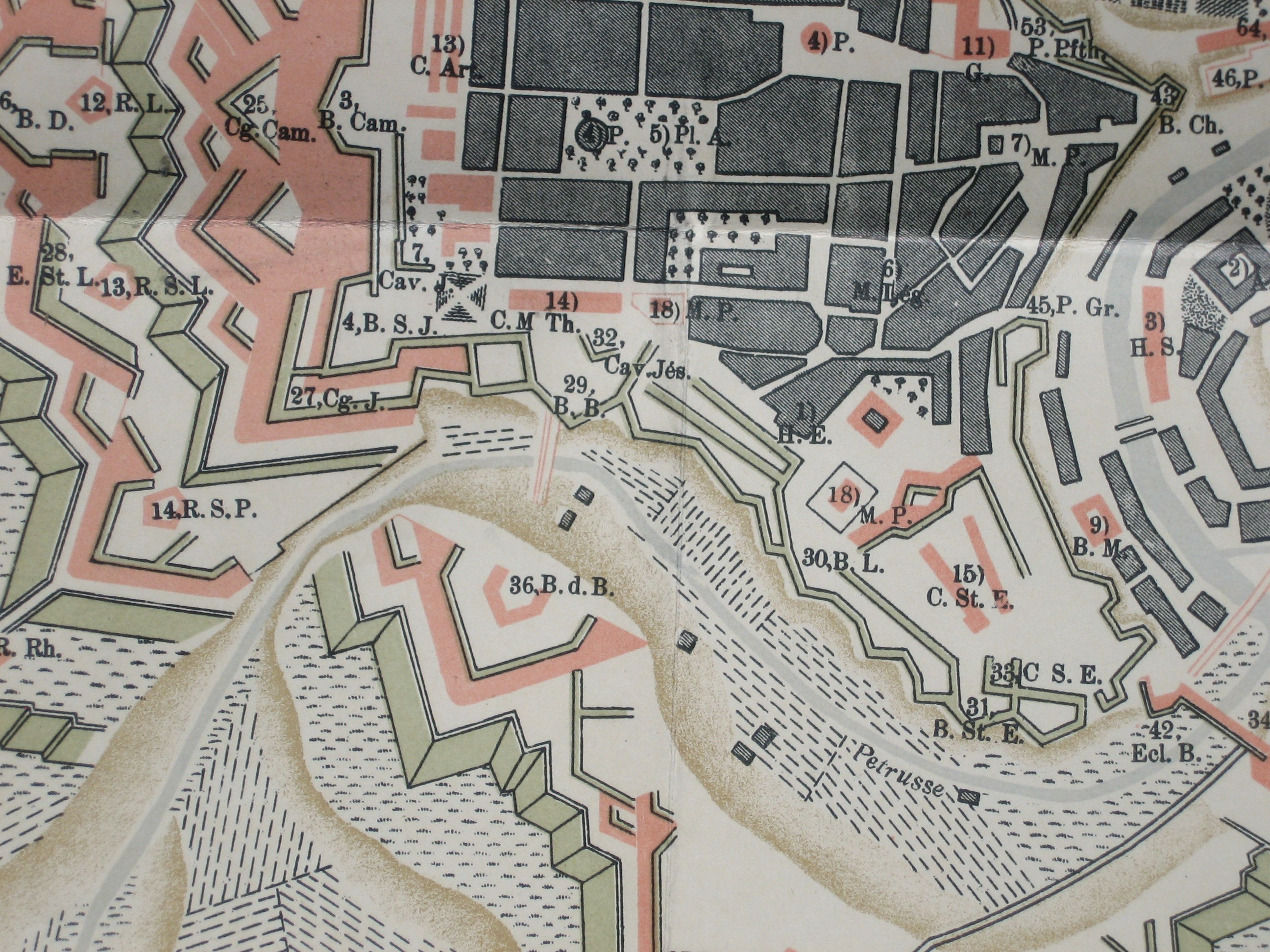 De Rempart vun der Festung Lëtzebuerg, 1794 (den Deel nërdlech vun der Péitruss); Ausschnëtt aus der Kaart vum A, Lefort. Legend (vu lénks no riets): 14, R.S.P. = Redoute St Pierre 27, Cg.J. = Contregarde St Jost 4, B.S.J.= Bastion St Jost 29, B.B. = Bastion Beck 30, B.L. = Bastion Louis 31, B. St. E. = Bastion St Esprit